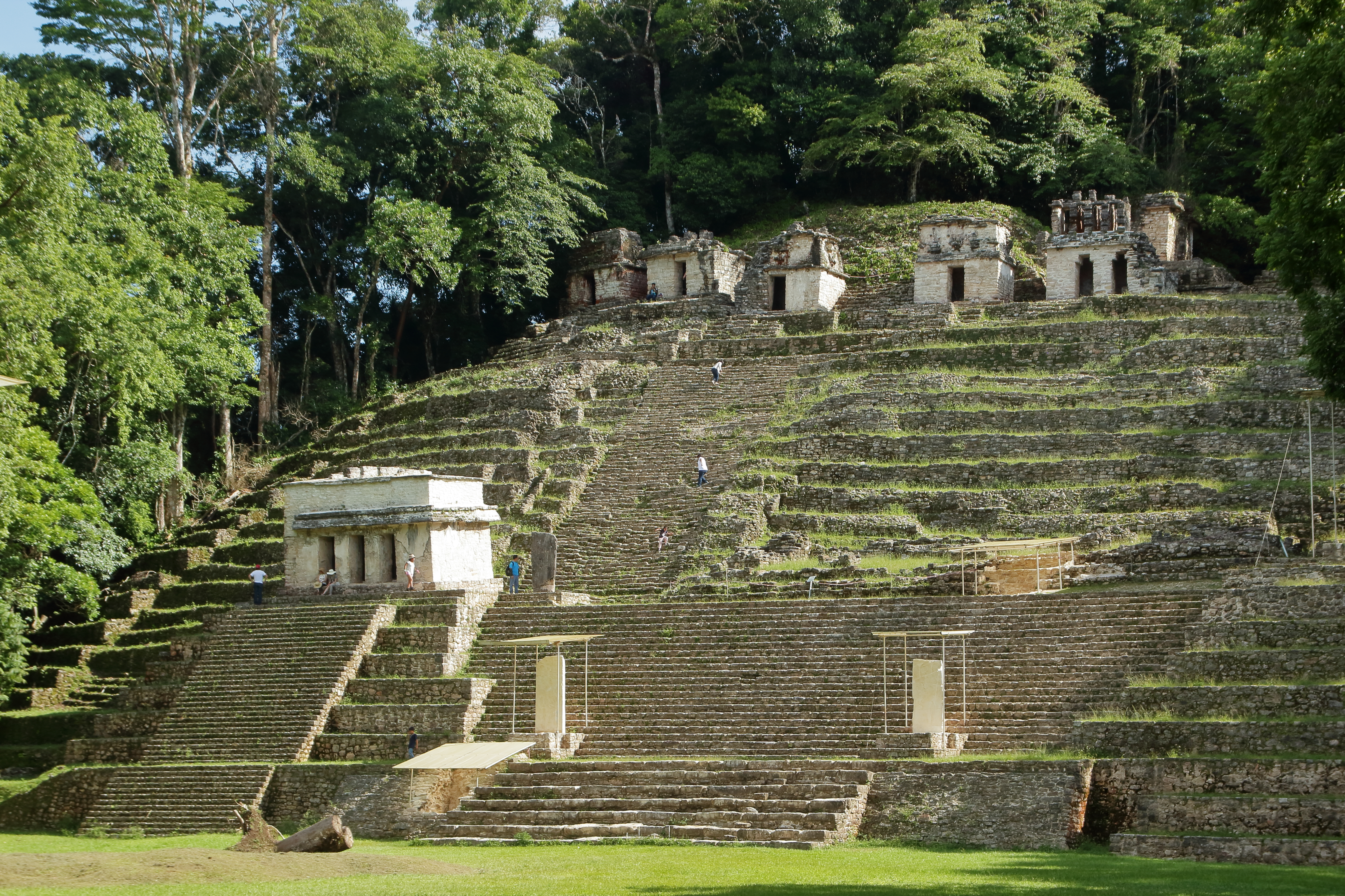 Vista sobre la zona arqueologica de Bonampak